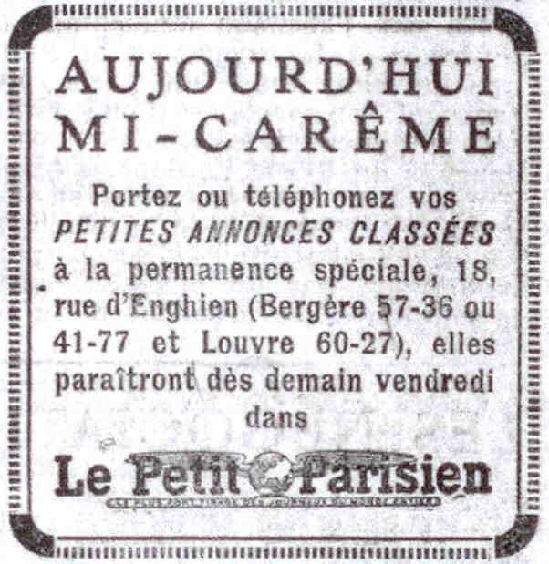 Annonce dans le Petit Parisien mentionnant la Mi-Carême.